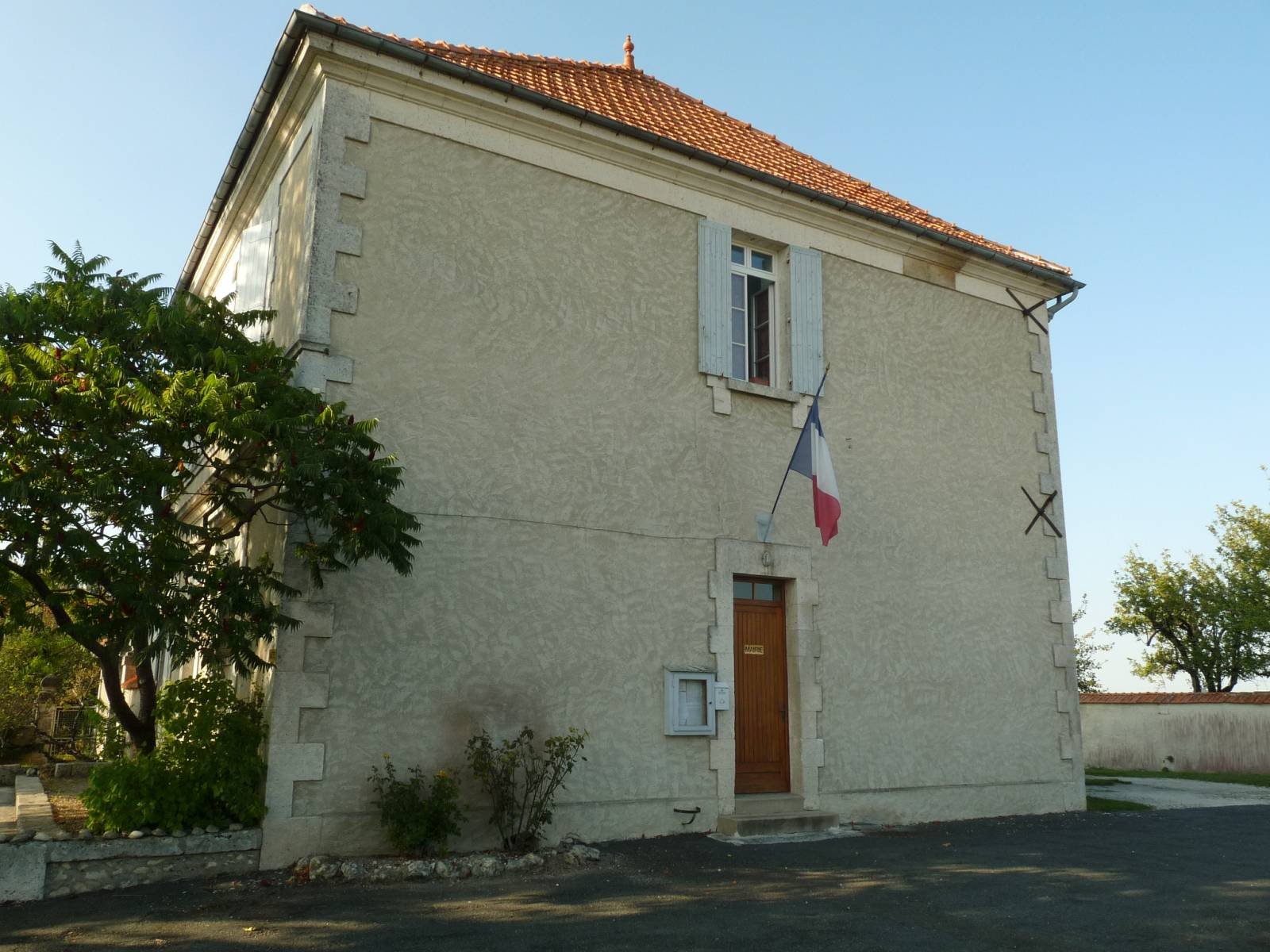 mairie d'Aubeville (16), France